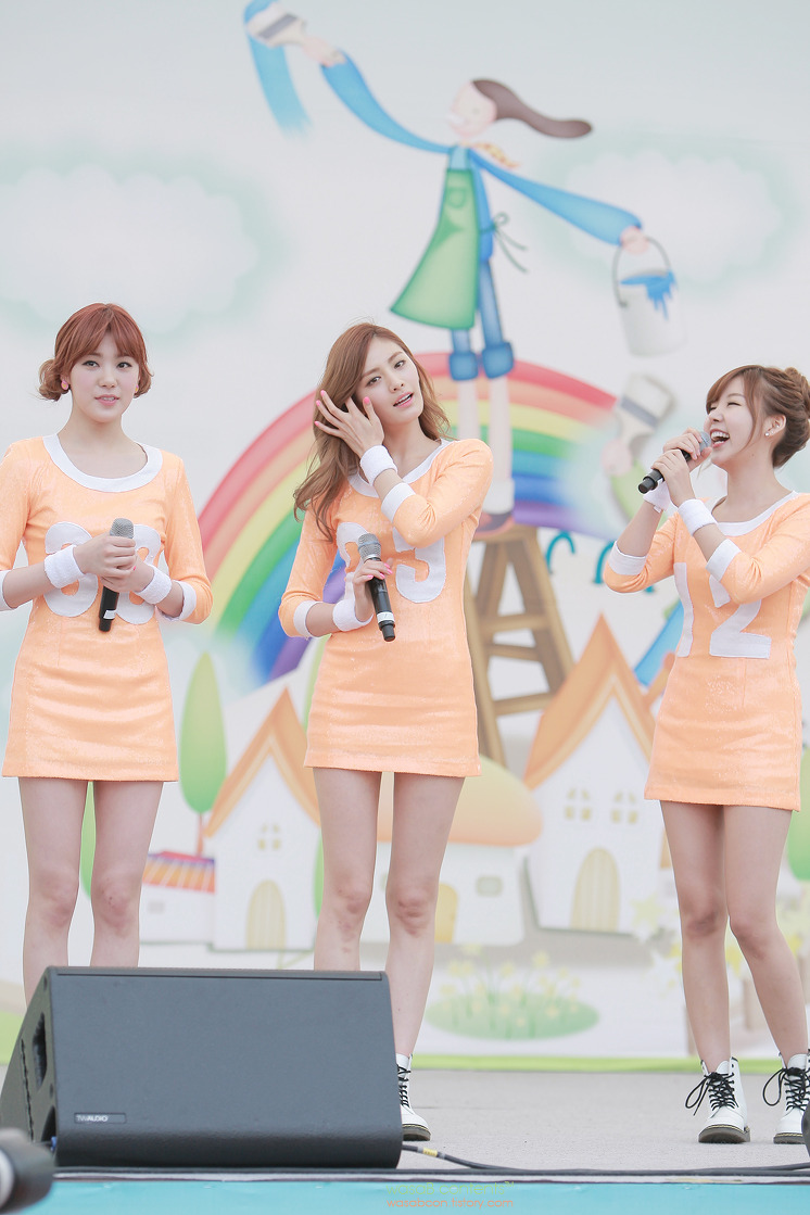 2013년 5월 6일 어린이대공원 꿈나무축제 가족그림소풍에서 오렌지 캬라멜.